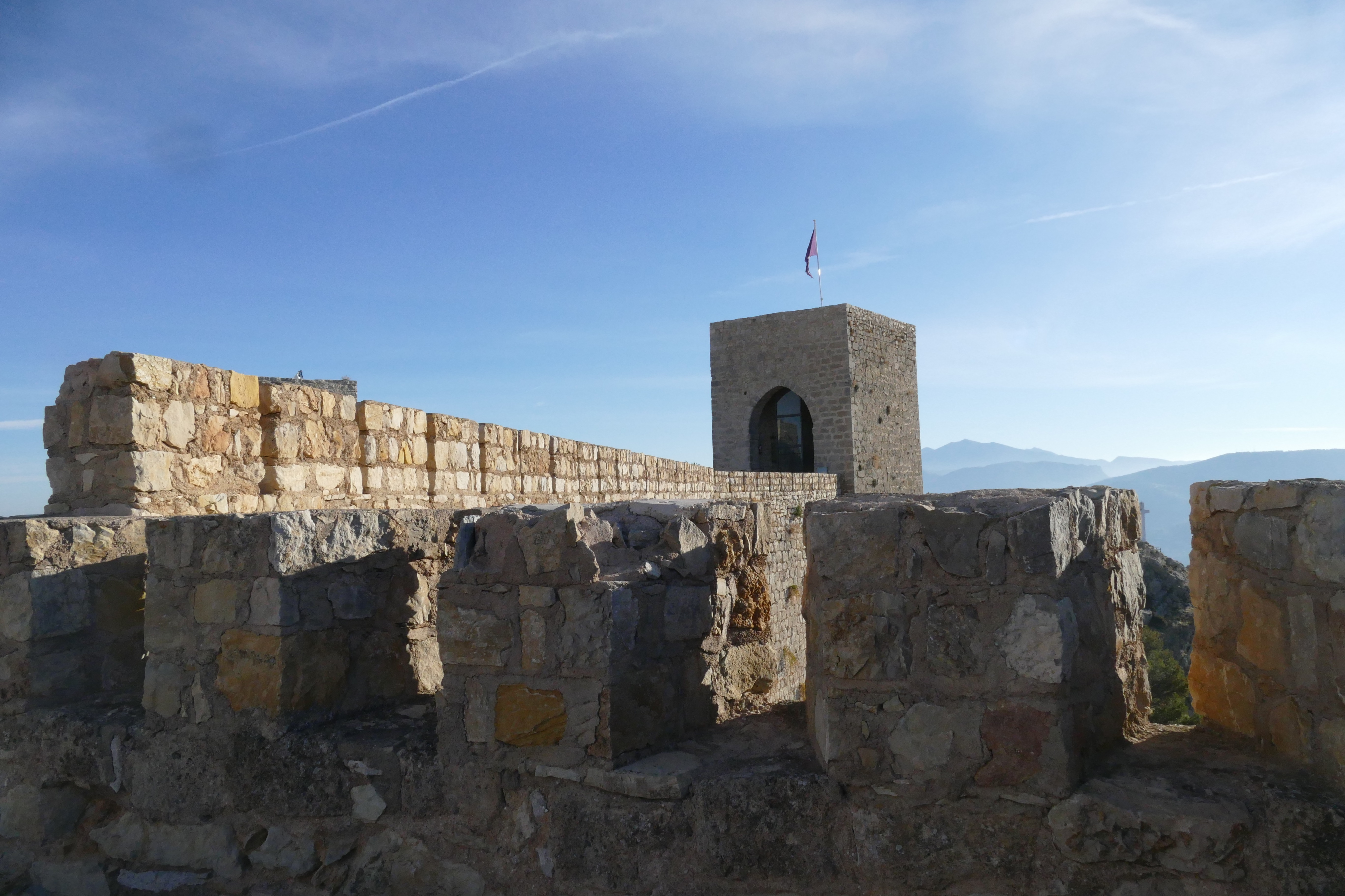 Замъка Санта Каталина, Хаен, Андалусия, Испания